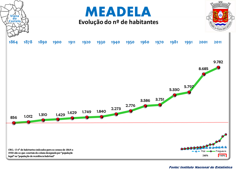 Censos 1864/2011